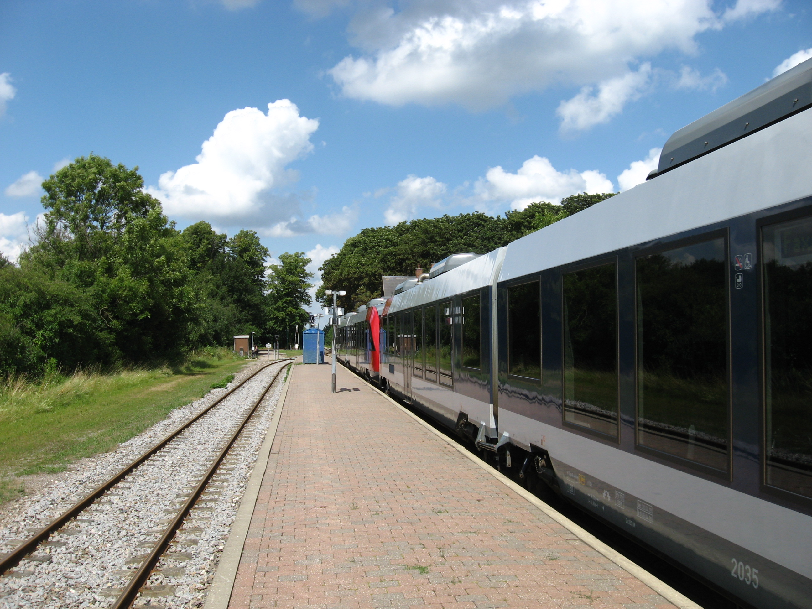 Trein bij Vallø station bij de Østbanen